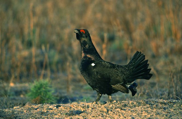 Gewöhnliches Rackelhuhn, Hybrid Tetrao urogallus × Lyrurus tetrix